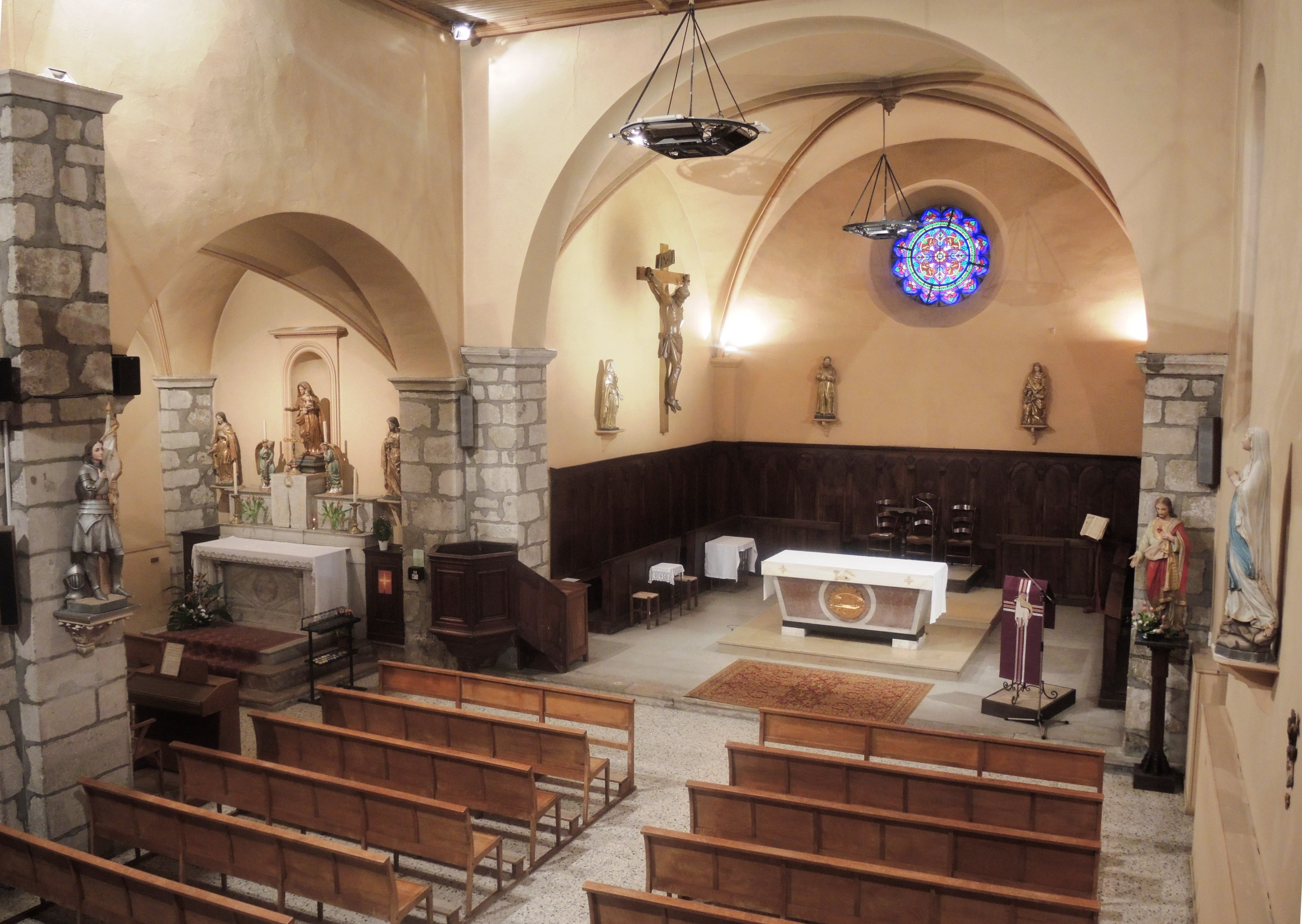 Saint-Désirat détail